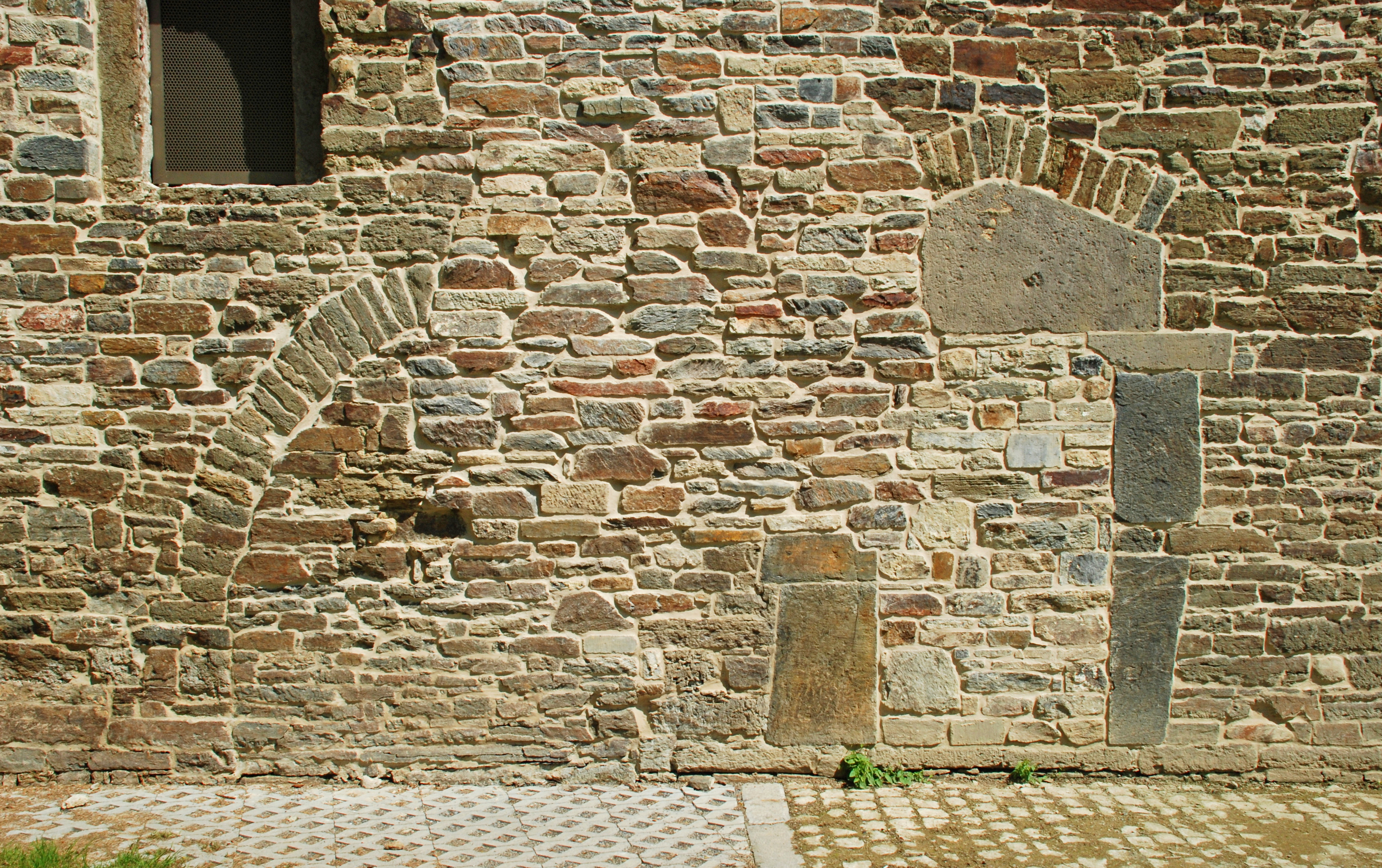 Belgique- Brabant wallon - Villers-la-Ville - ancien moulin abbatial This photo of immovable heritage has been taken in the Walloon Region